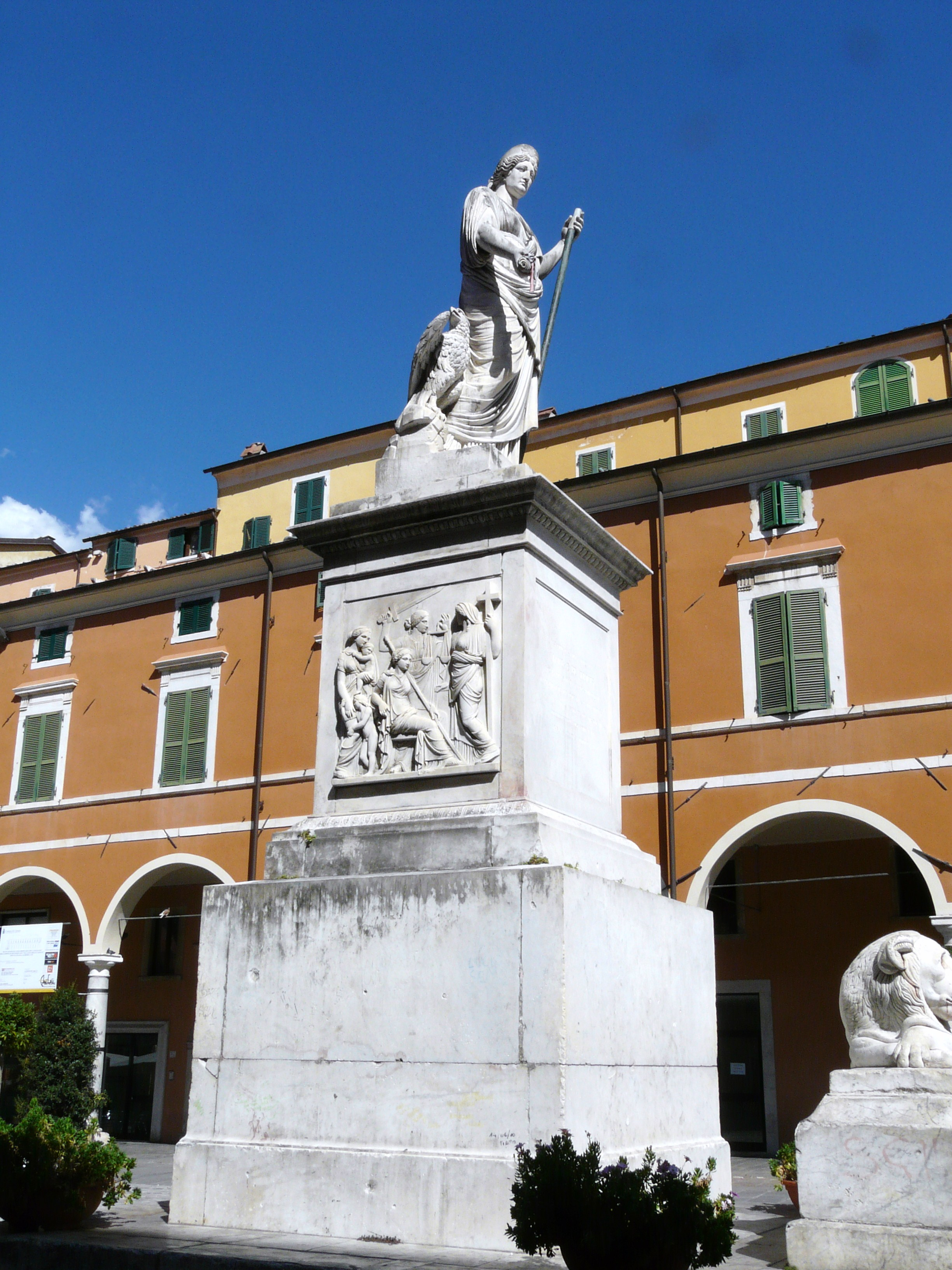 Piazza Alberica, monumento a Beatrice Maria d'Este, Carrara, Toscana, Italia